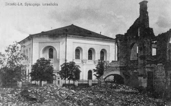 Synagoga w Brześciu